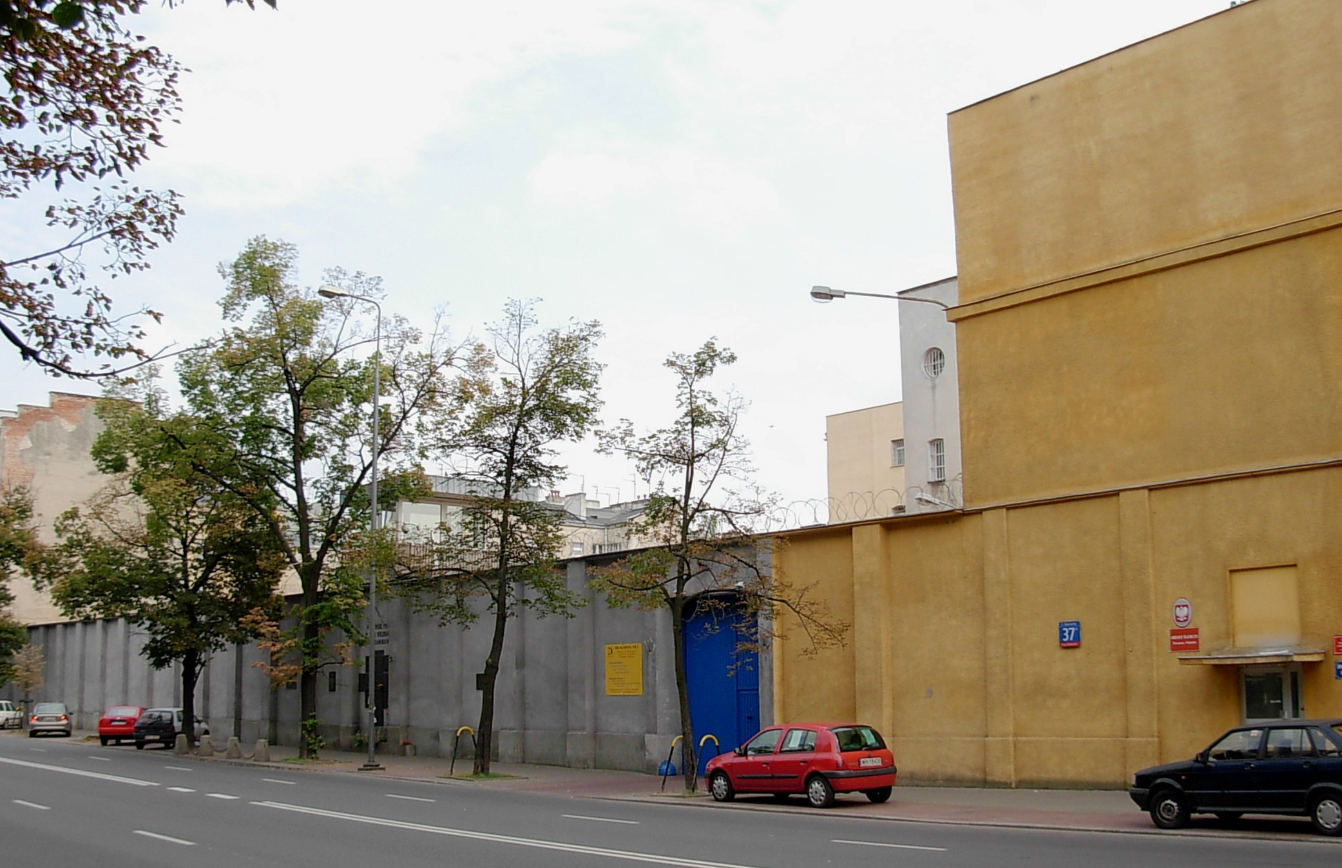 Mokotow Prison, at 37, Rakowiecka Street in Warsaw